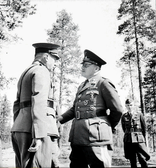 Kenraali Hj. Siilasvuo kättelee kenraalieversti Hans-Jürgen Stumpffia, Saksan pohjoisrintamalle sijoitetun 5. ilma-armeijan komentajaa (v.1941-44)